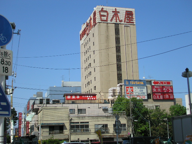 Monteroza Billdings.